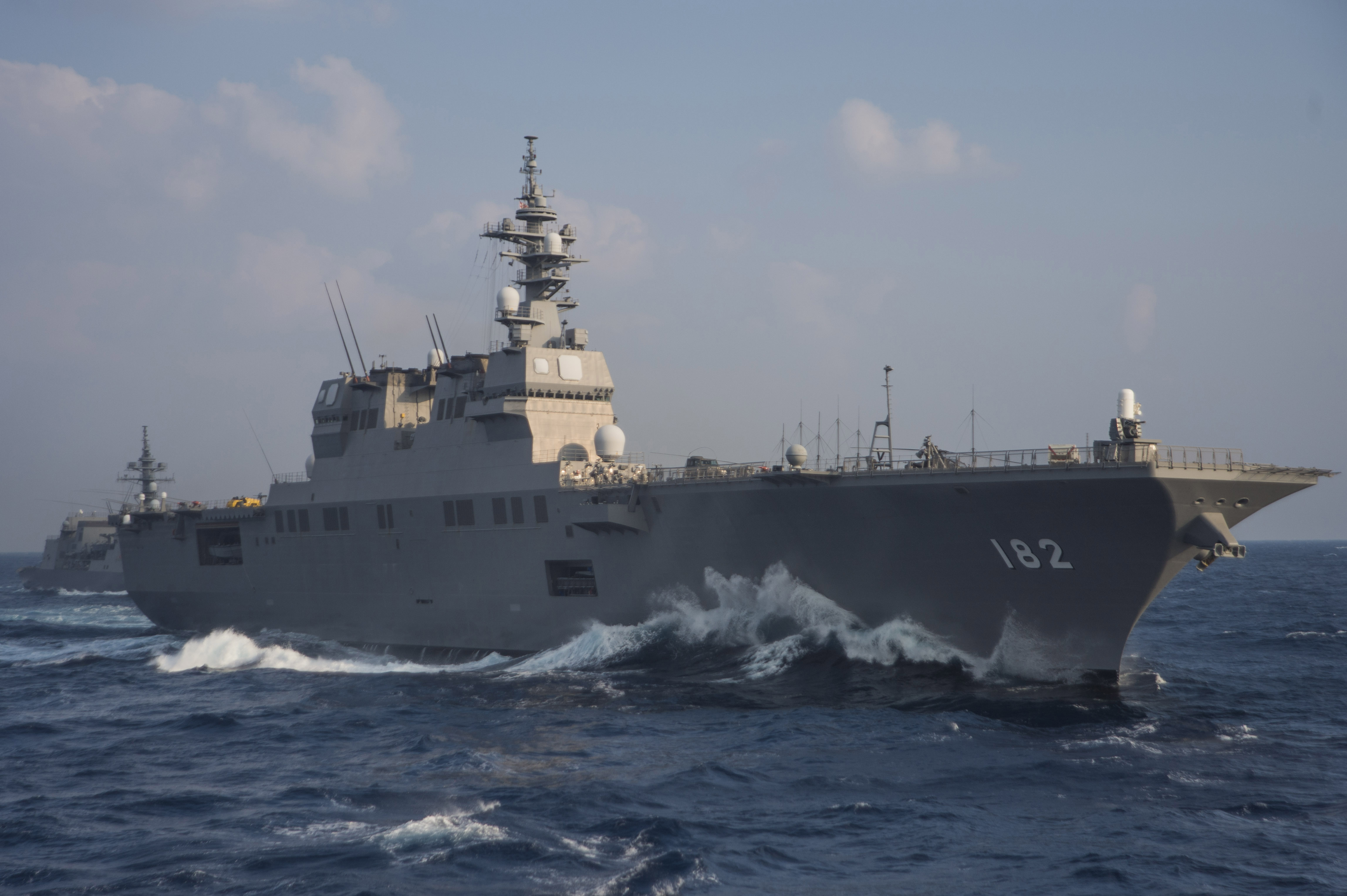 太平洋を航行する護衛艦いせ 〔手前〕 と同あきづき 〔奥〕 。日米共同統合演習キーン・ソード2015に参加中。